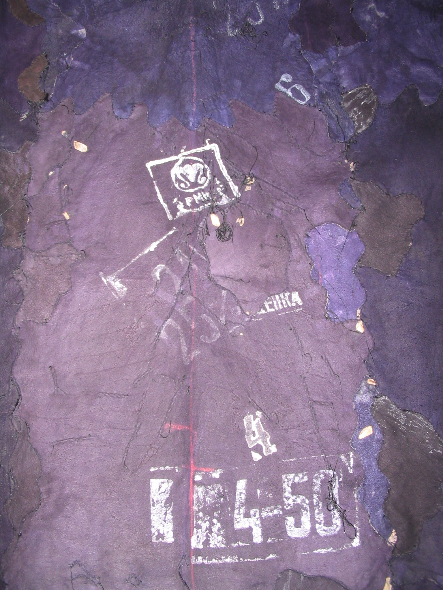 Ausschnitt eines handgenähten Russisch Breitschwanzbodies von der Lederseite; israelische Arbeit. Gesehen beim Kürschner Germain Martens, Lochristi, Belgien